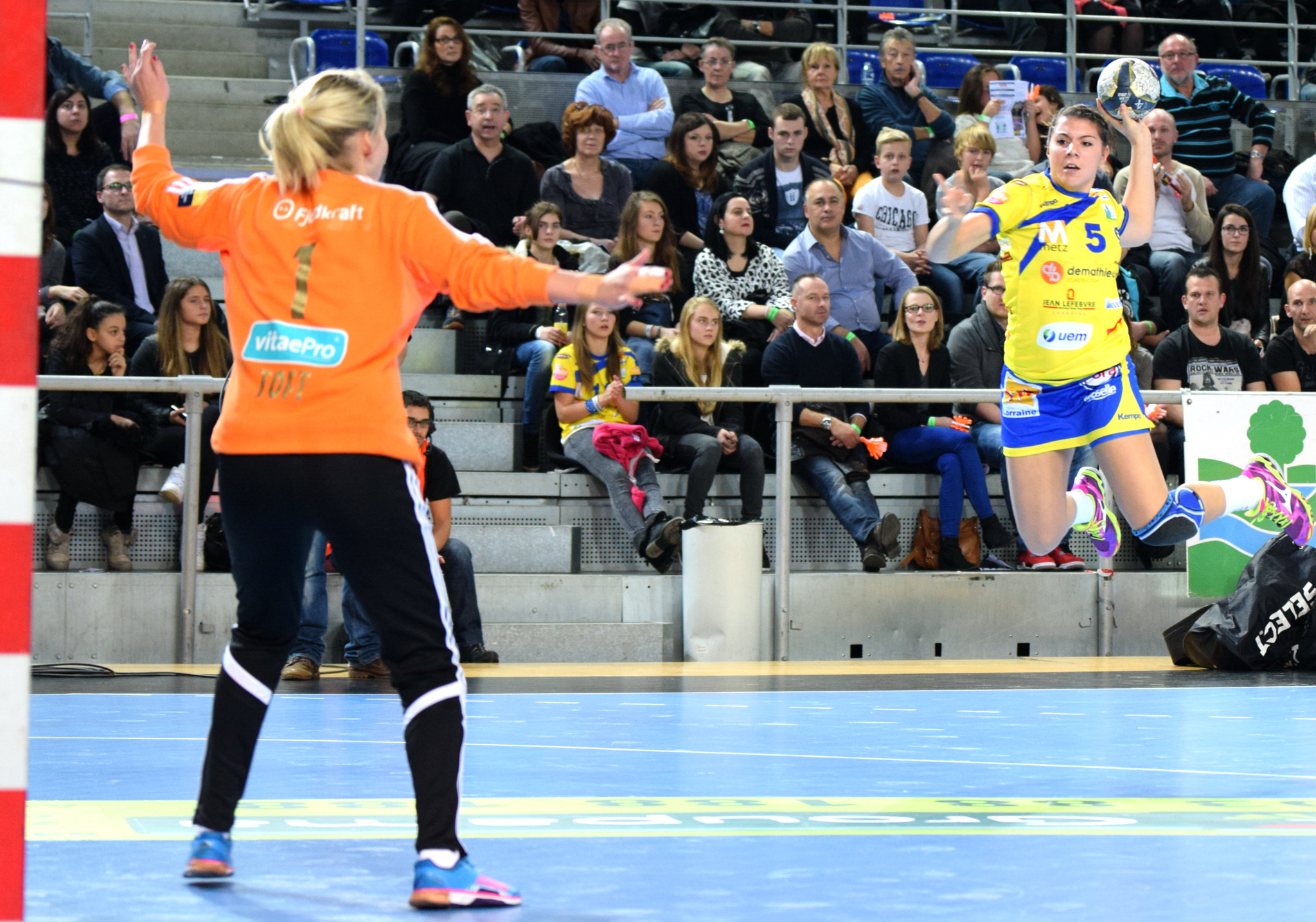 Laura Flippes , le 15 novembre 2014 lors du match de Ligue des champions Metz / Larvik.